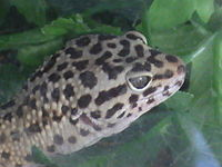 Drago_adult